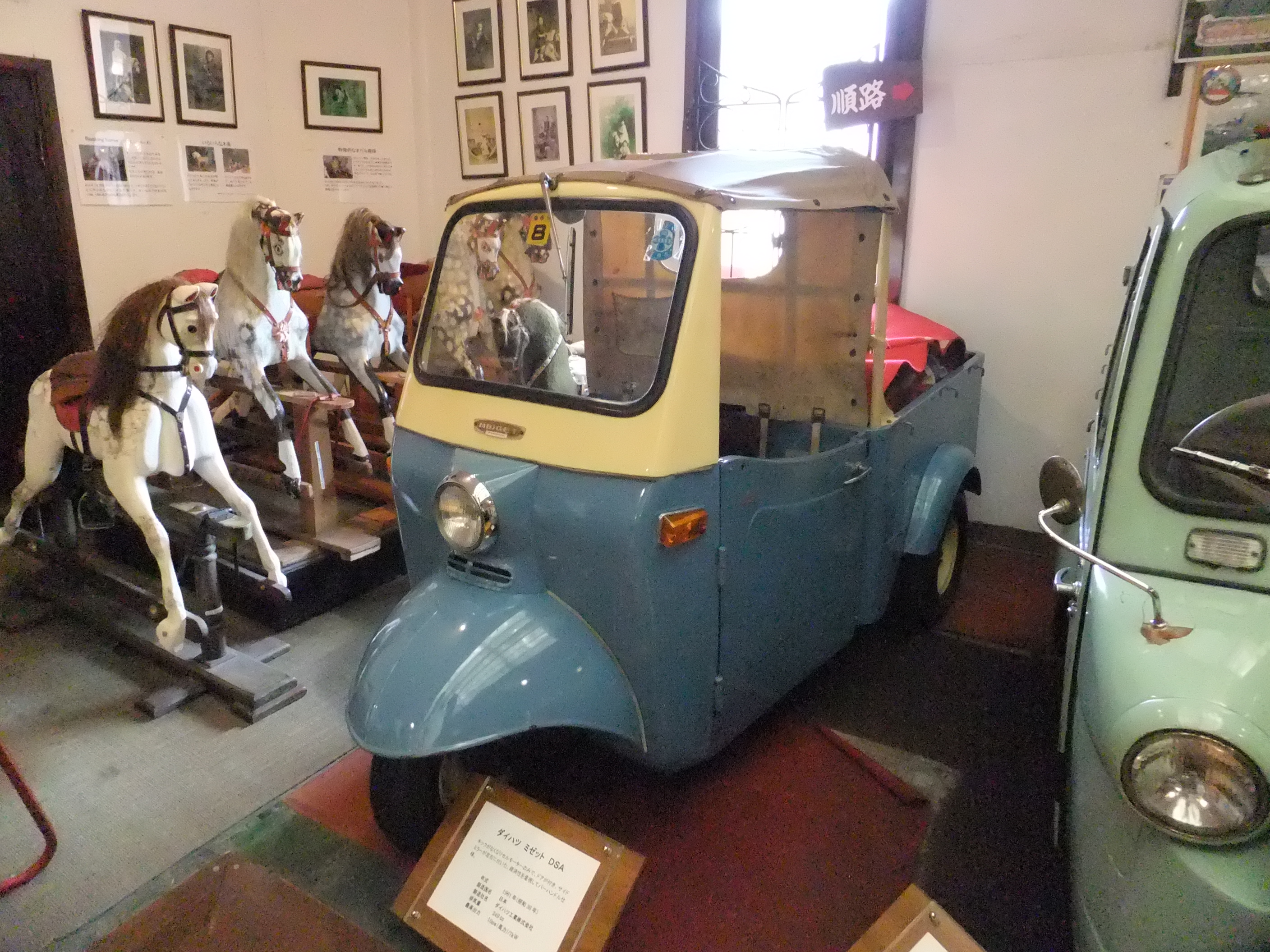 福山自動車時計博物館所蔵 ダイハツミゼットDA5